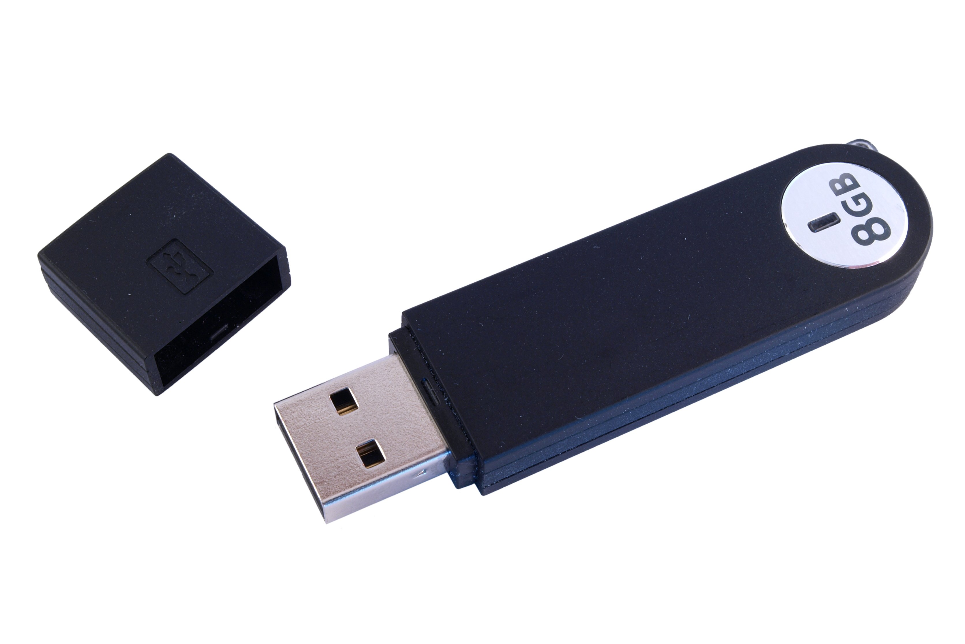 USB Massenspeichermedium, 8 GB